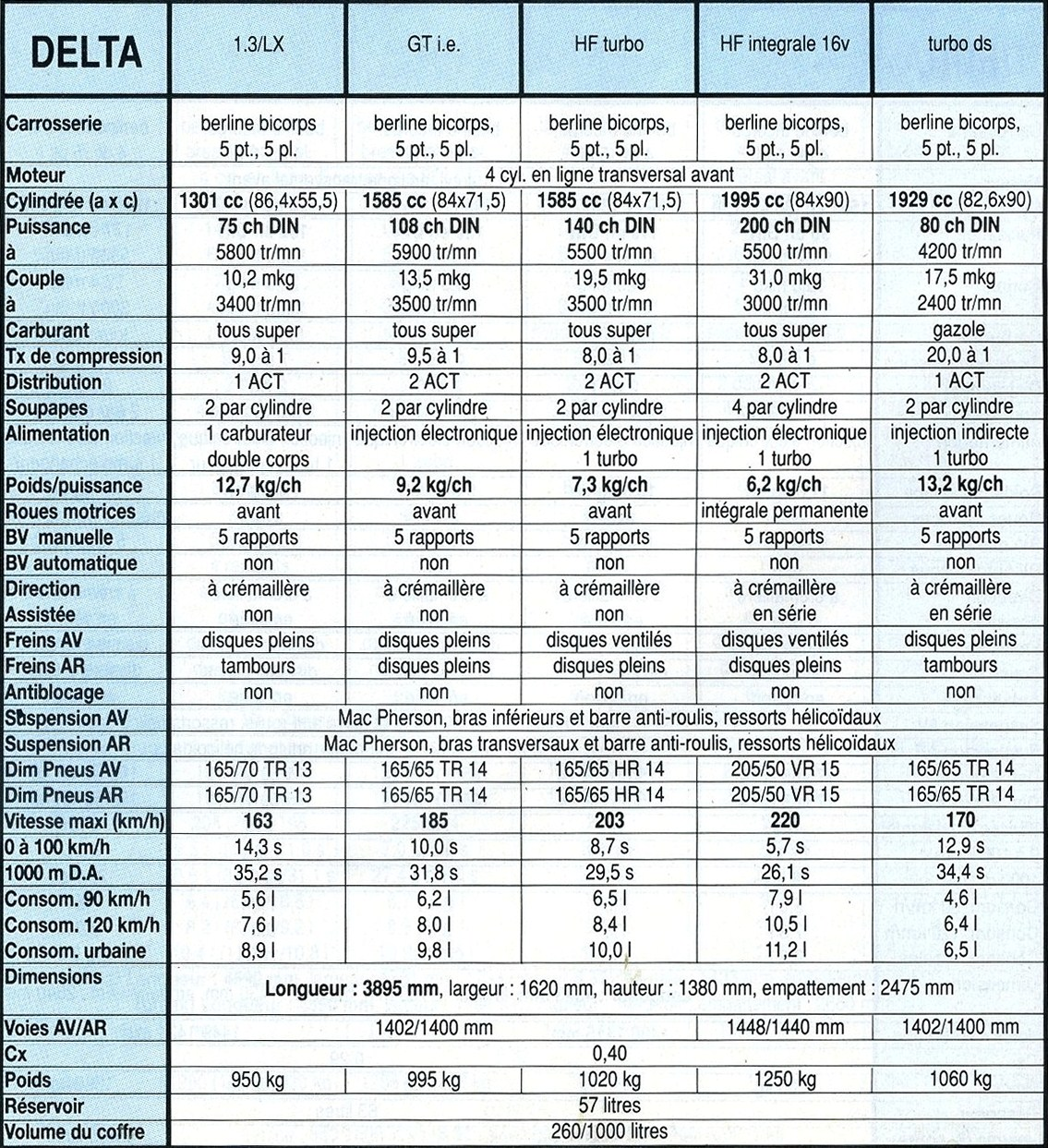 Tableau récapitulatif de la lancia Delta 1er gen, Phase 2, dont les informations sont de 1991